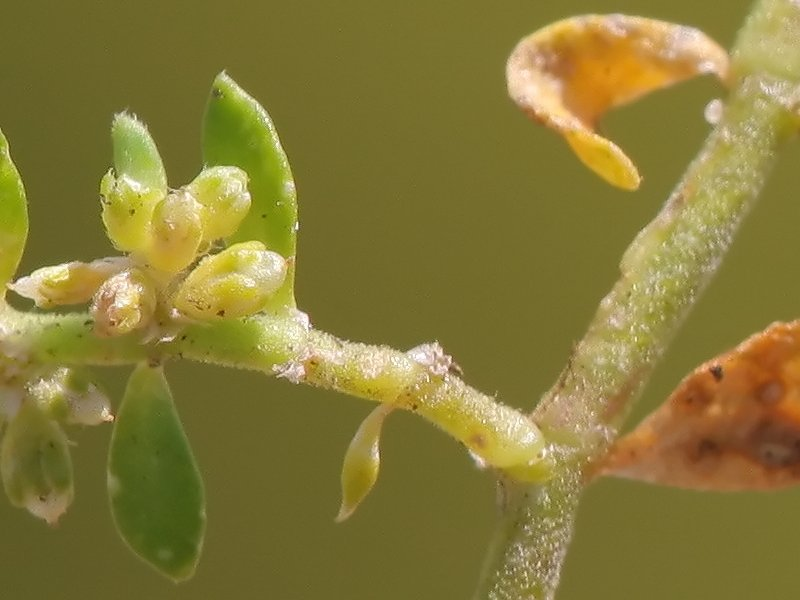 Kahles Bruchkraut (Herniaria glabra)